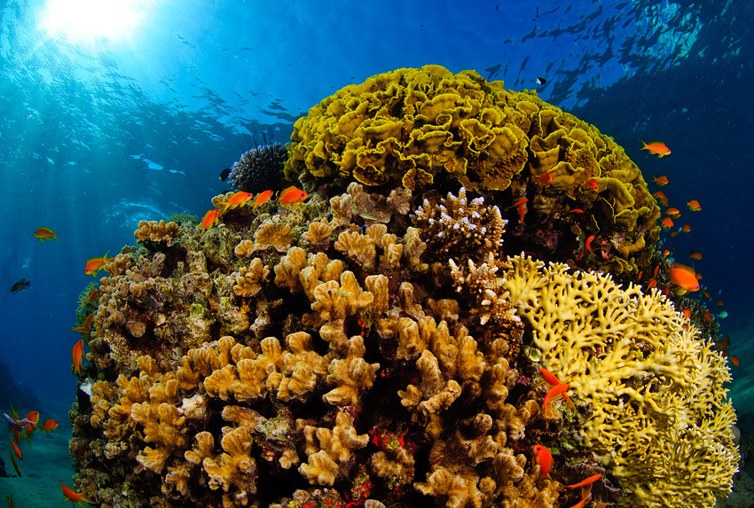 שונית אלמוגים באילת Arriba, colonia de Turbinaria; a la derecha Millepora.